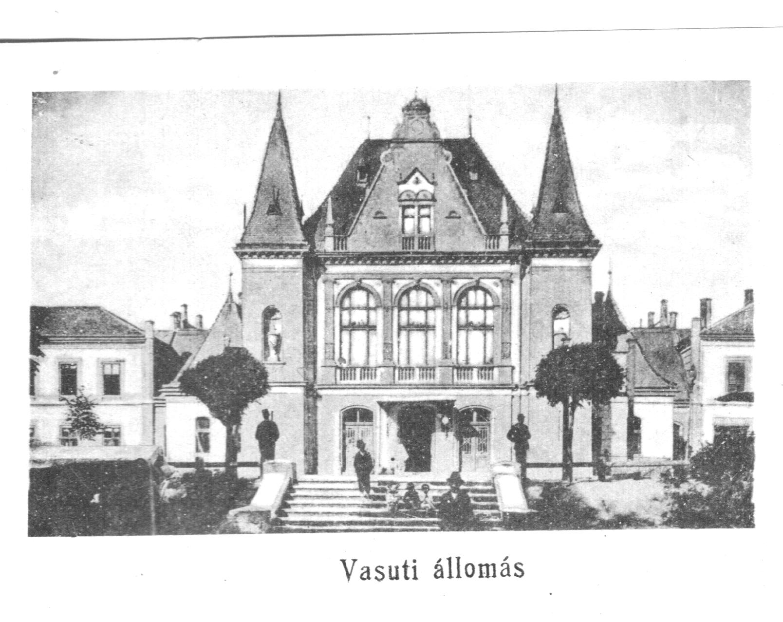 A felvétel a Kassa elnevezésű képeslap gyűjtemény részét képezi. A képeslap címoldala az (1) jelzésű kép. A további felvételek a kinyitható képeslap belsejében elhelyezett leporello képei. (Az elsőt a felső képek közül nem sikerült másolni – Fő-utca a színházzal – mivel a képeslap konténert a másolás roncsolta volna. A felvételek megjelentek Creative Commons alatt a Metapolisz DVD sorozatban. (1-10).